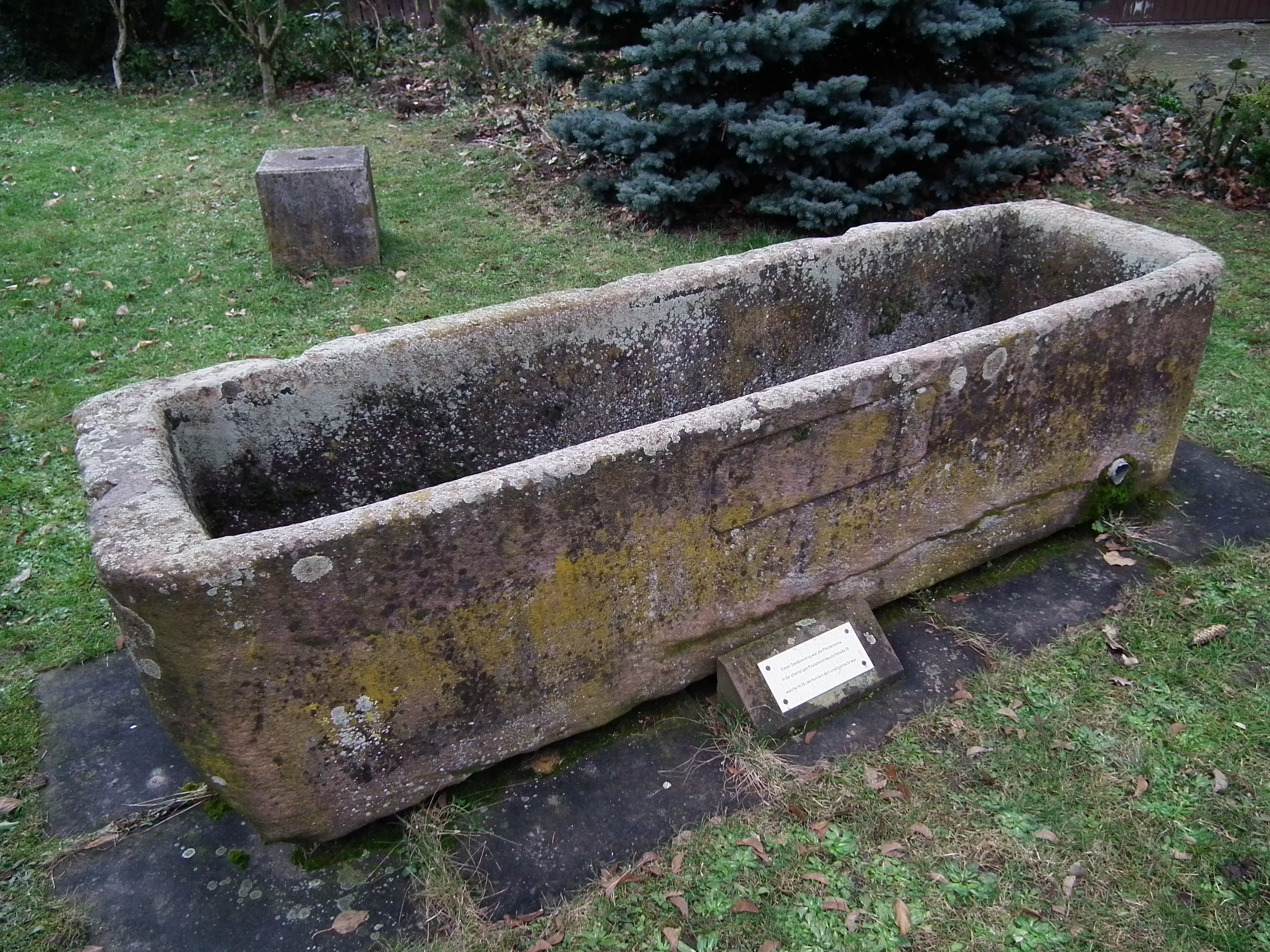 Sandsteintrog, welcher in der früheren Poststation in Mannheim-Friedrichsfeld als Pferdetränke genutzt wurde; 2011 befand er sich vor der katholischen Kirche St. Bonifatius (Baden-Württemberg, Deutschland)